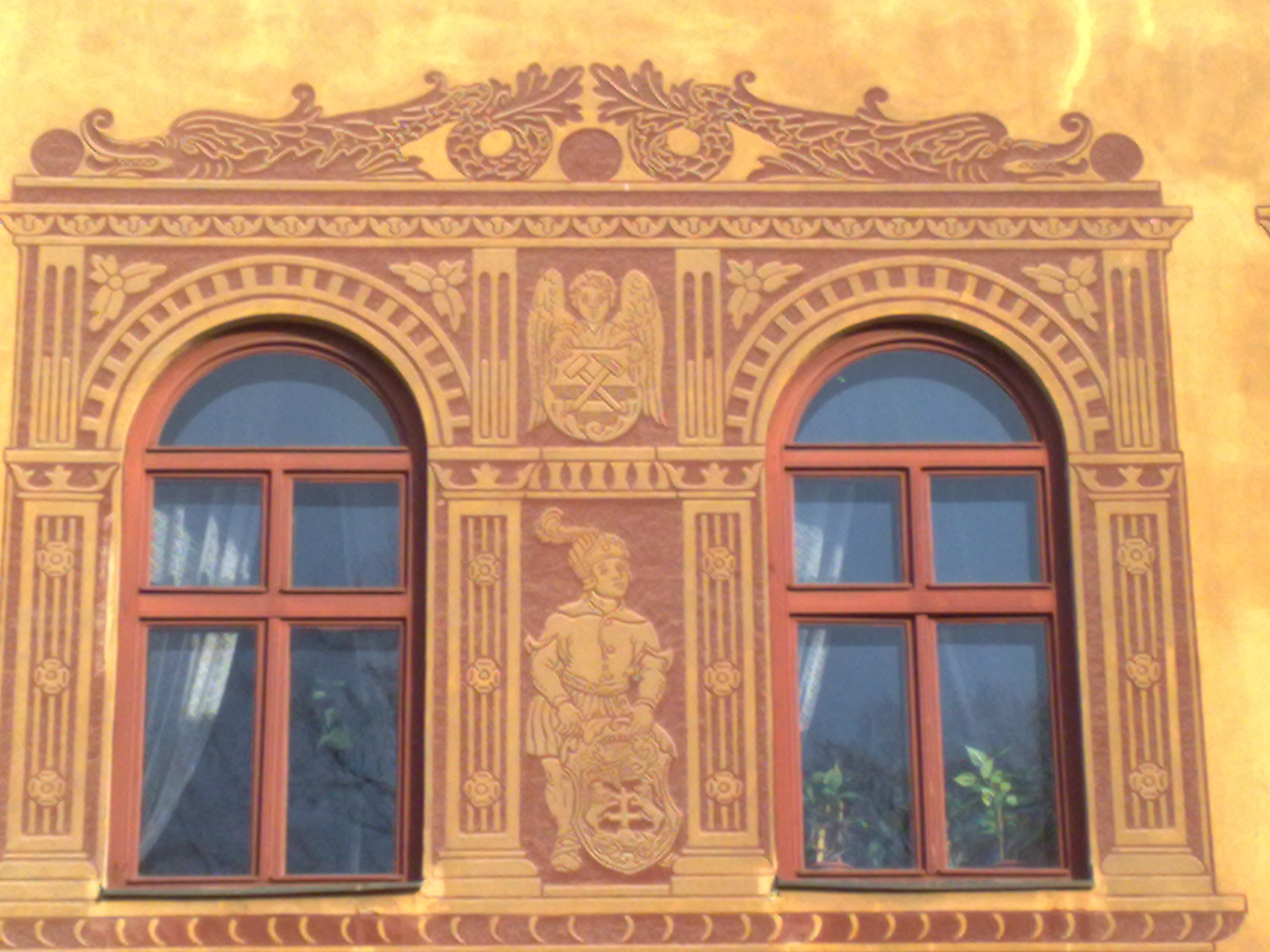 Levoca, Slovakia